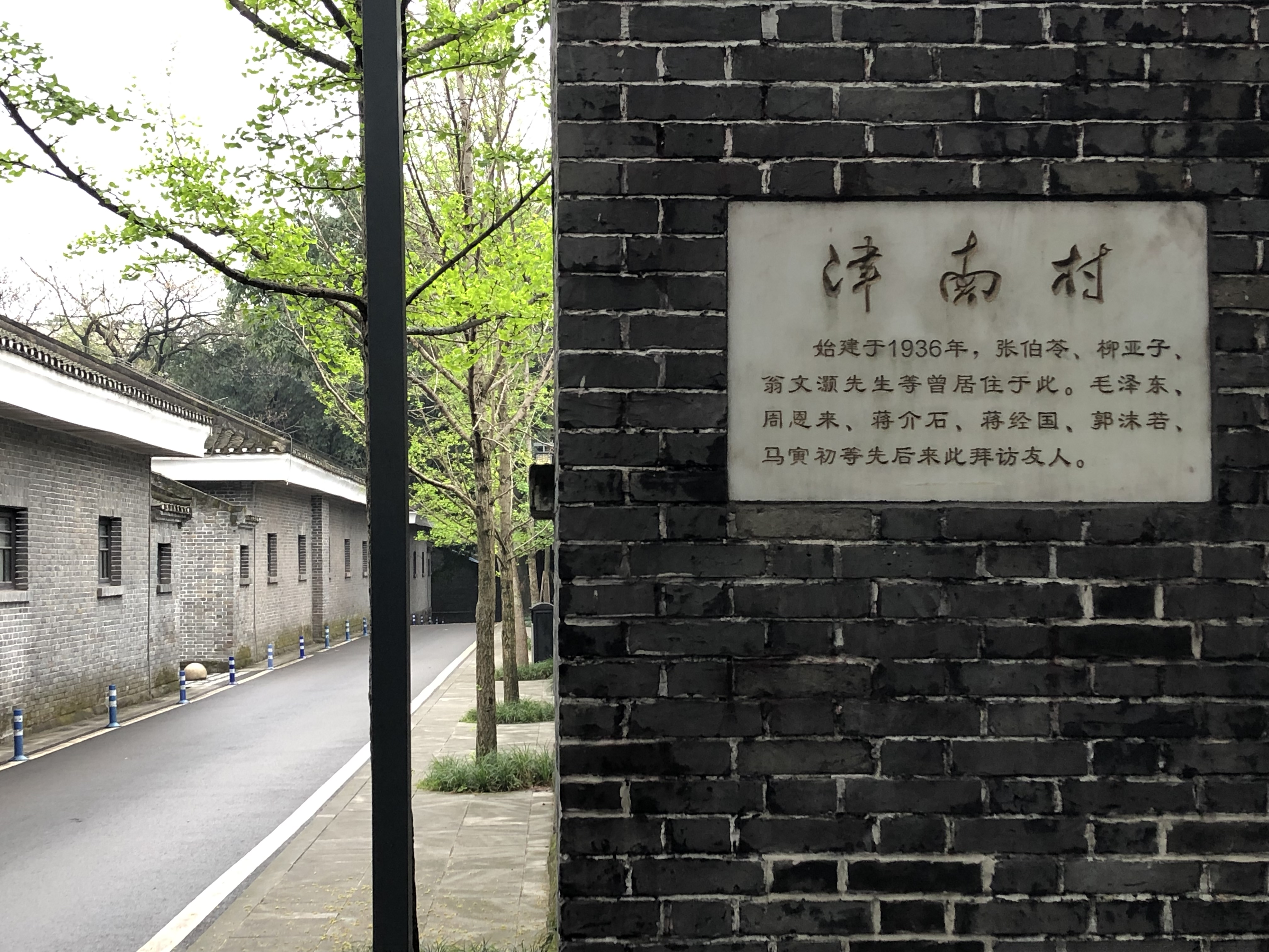 中文（中国大陆）: 津南村铭牌